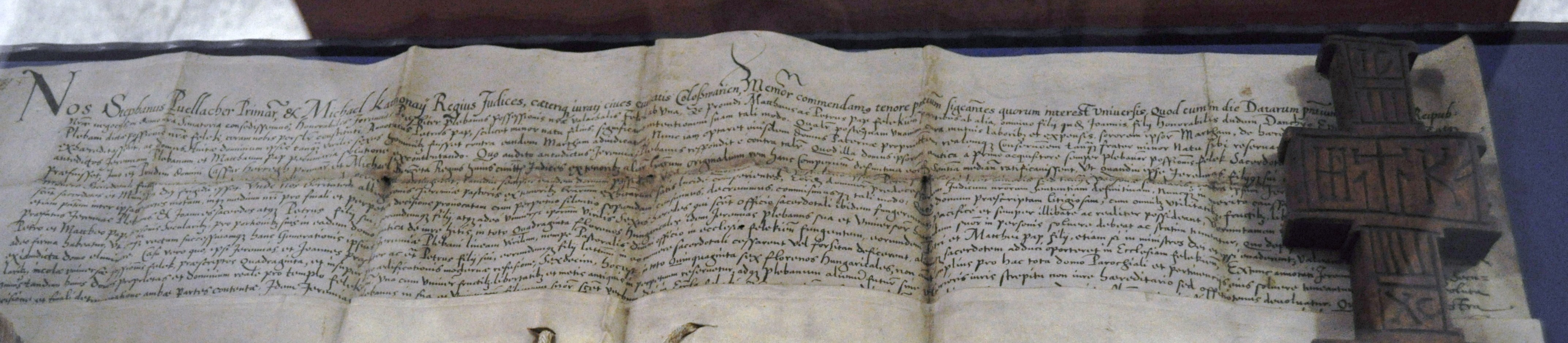 Document pe pergament (1593), aflat în depozitele Arhiepiscopiei Clujului, care menționează episcopii din Feleac